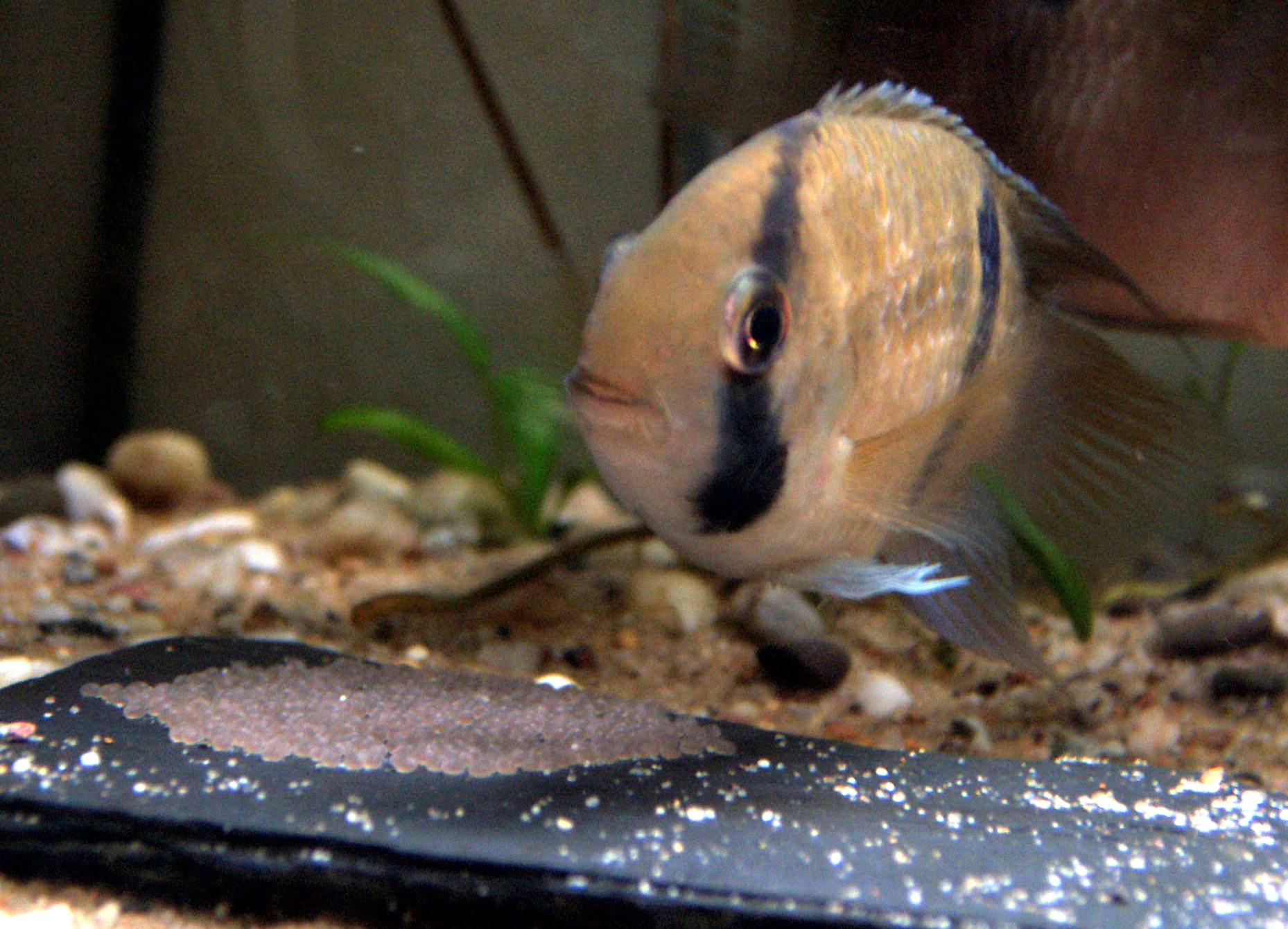 Maroni-Buntbarsch über seinem frischem Gelege